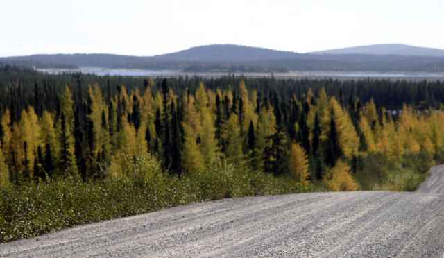 Petit effet pour montrer la route Transtaïga, une route en gravier, longue de 666 km et qui nous emmène "ailleurs". La route débute à Radisson, dans le nord du Québec.